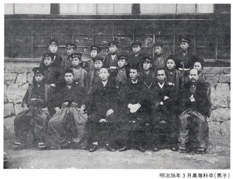 瑞浪市立日吉第一小学校 明治36年3月高等科卒（男子）